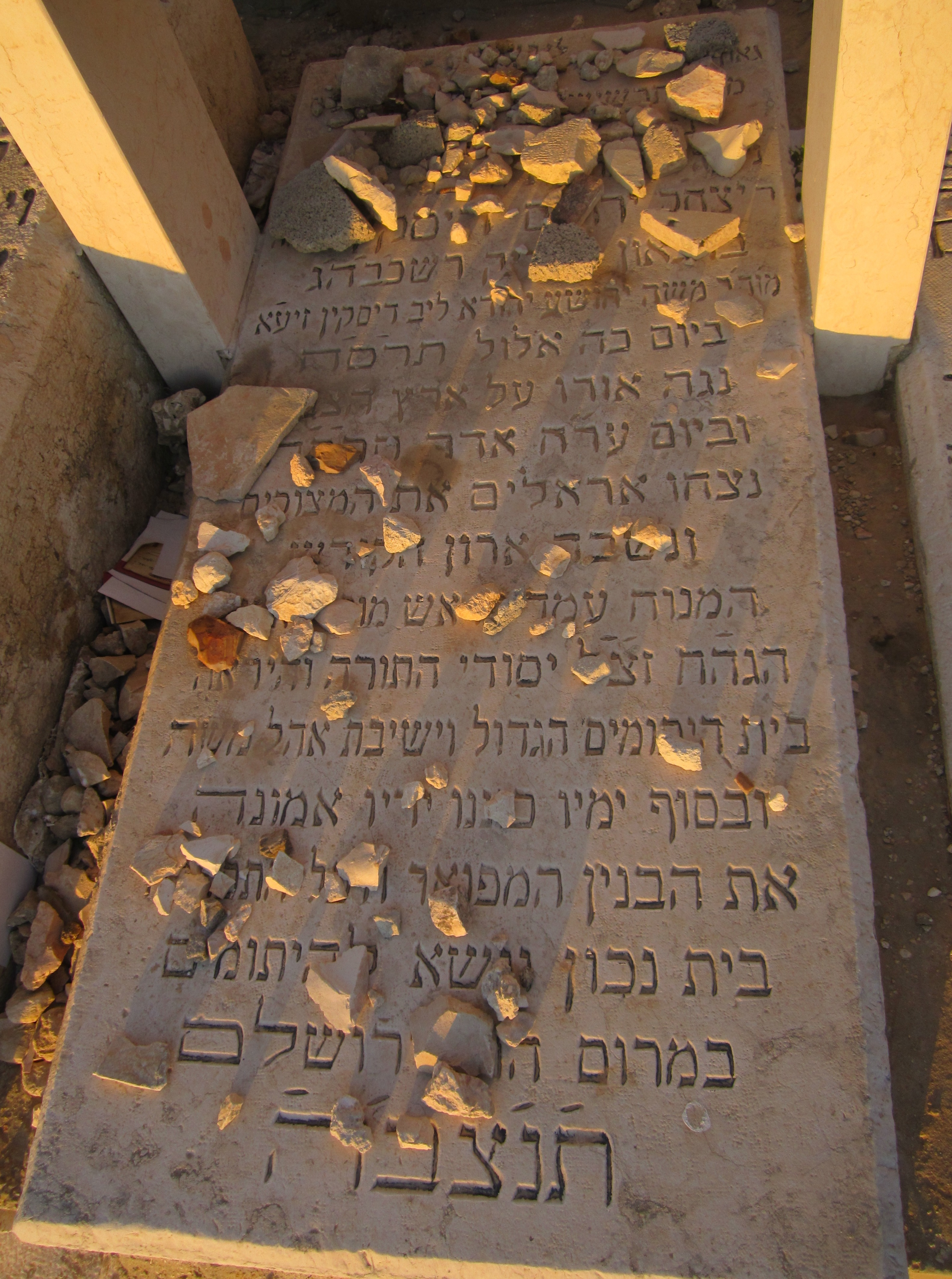 קבר הרב יצחק ירוחם דיסקין בהר הזיתים